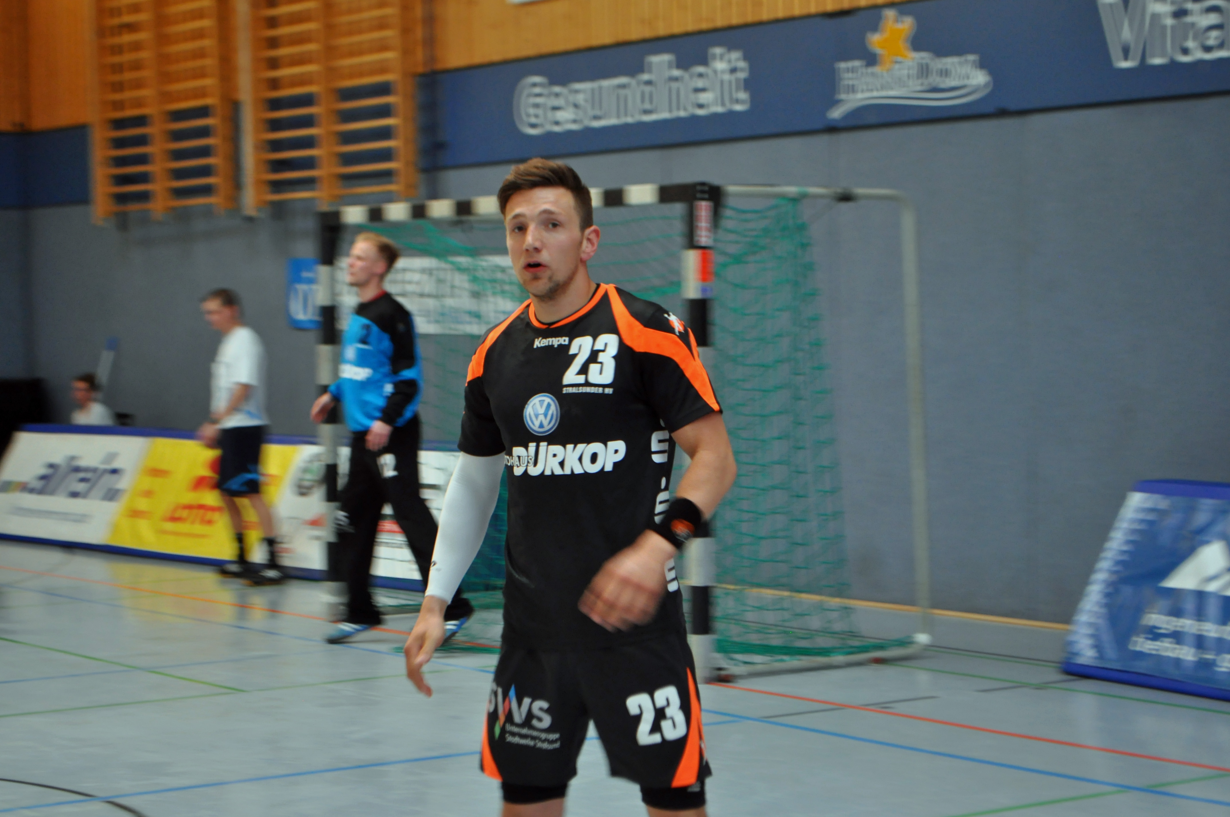 Beim Spiel der ersten Männer-Mannschaft des Stralsunder HV nach dem Punktspiel am 26.4.2014 gegen den Lausitzer HC in der Vogelsanghalle Stralsund. Durch den 37:28-Sieg wurde das Team Meister der Oberliga Ostsee-Spree und steht als Aufsteiger in die 3. Liga (DHB) fest. Im Bild Benjamin Hinz.